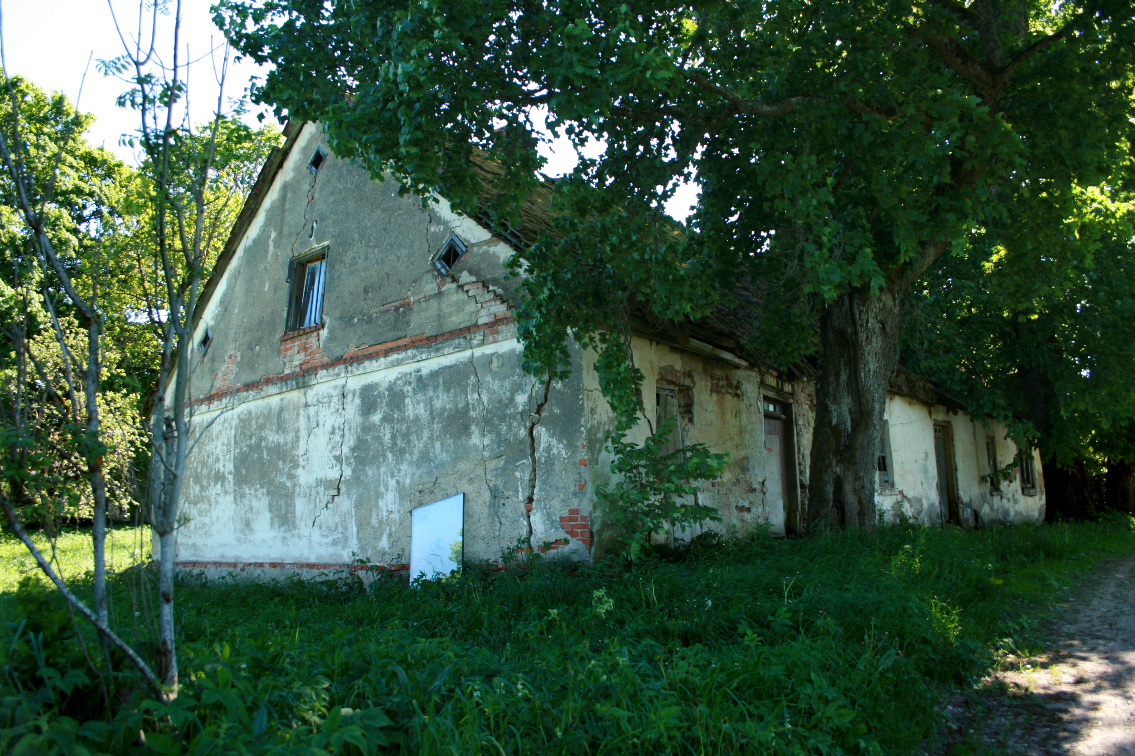 Todaizi